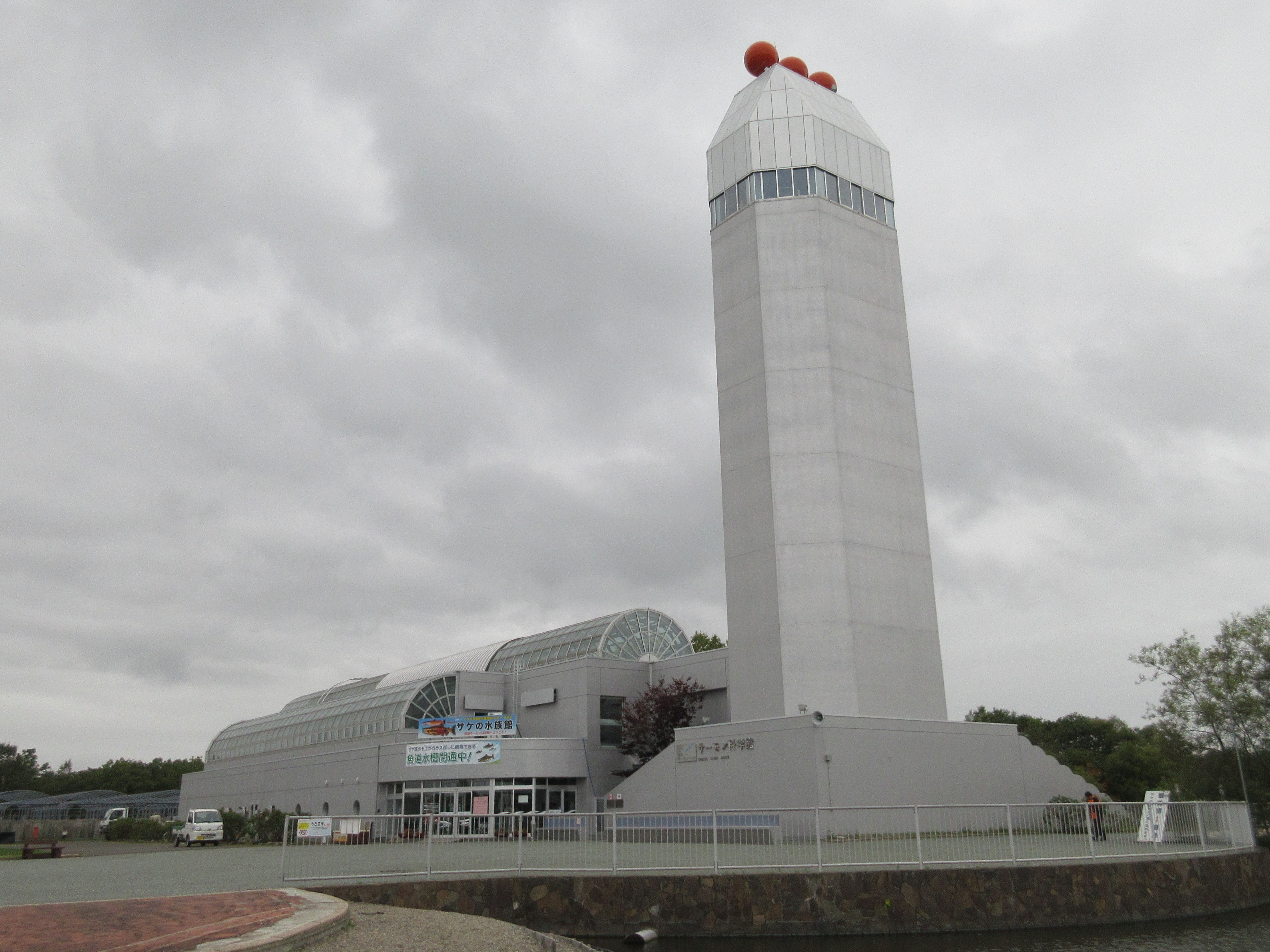 標津サーモン科学館